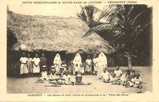 Carte postale ancienne : religieuses missionnaires de Notre-Dame des Apôtres vers 1920.